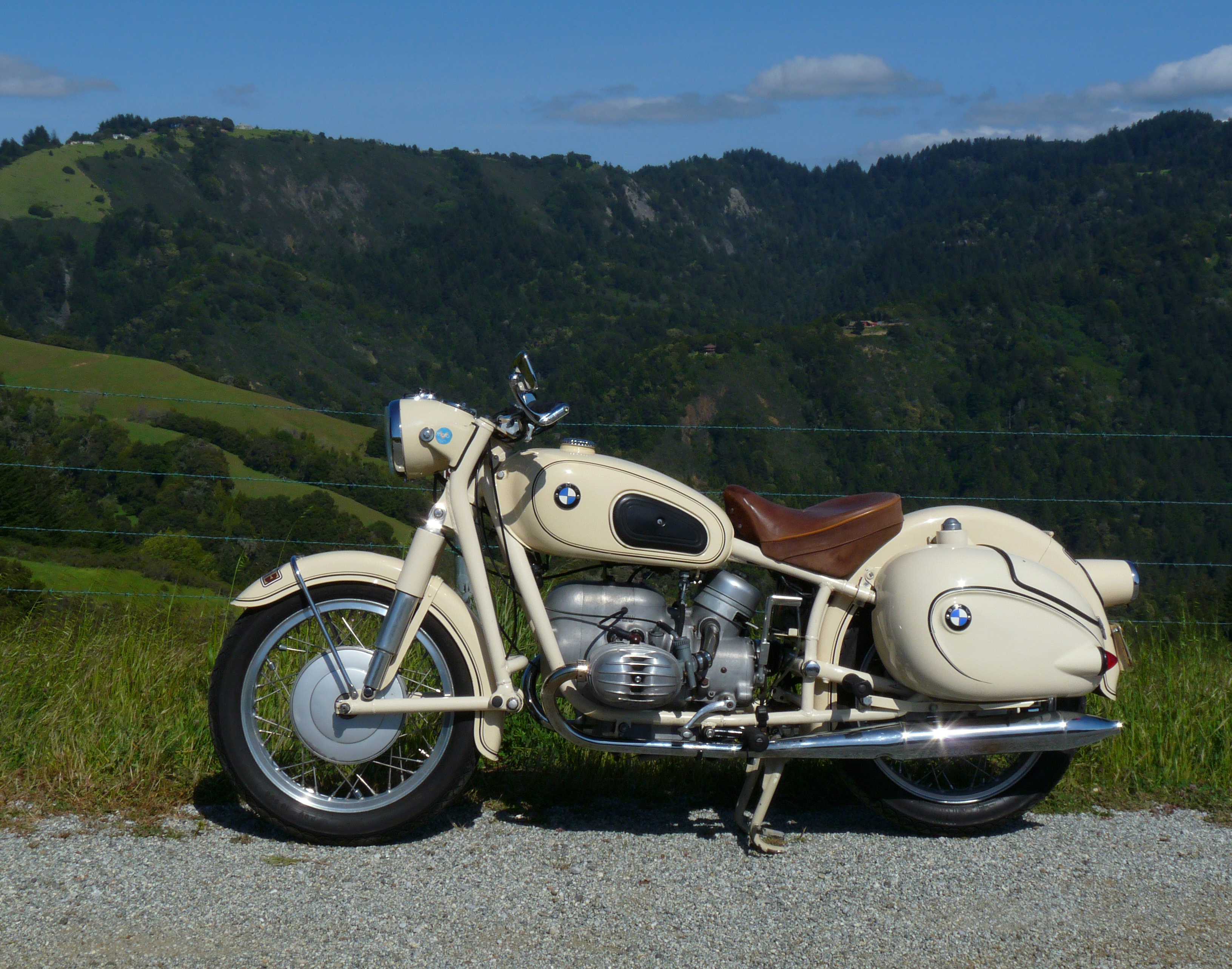 BMW R50 motorcycle